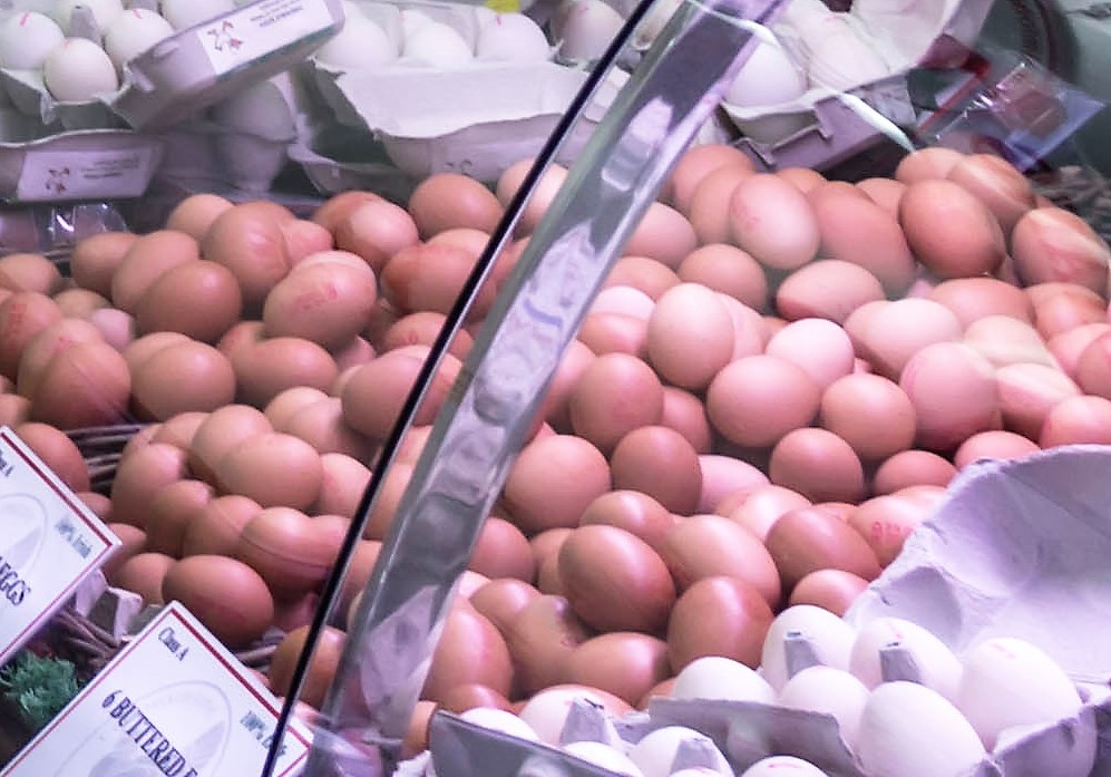 Angebot an Buttered eggs (hier die glänzenden, braunen Eier im Vordergrund) an einem Verkaufsstand im Englischen Markt in Cork, Irland